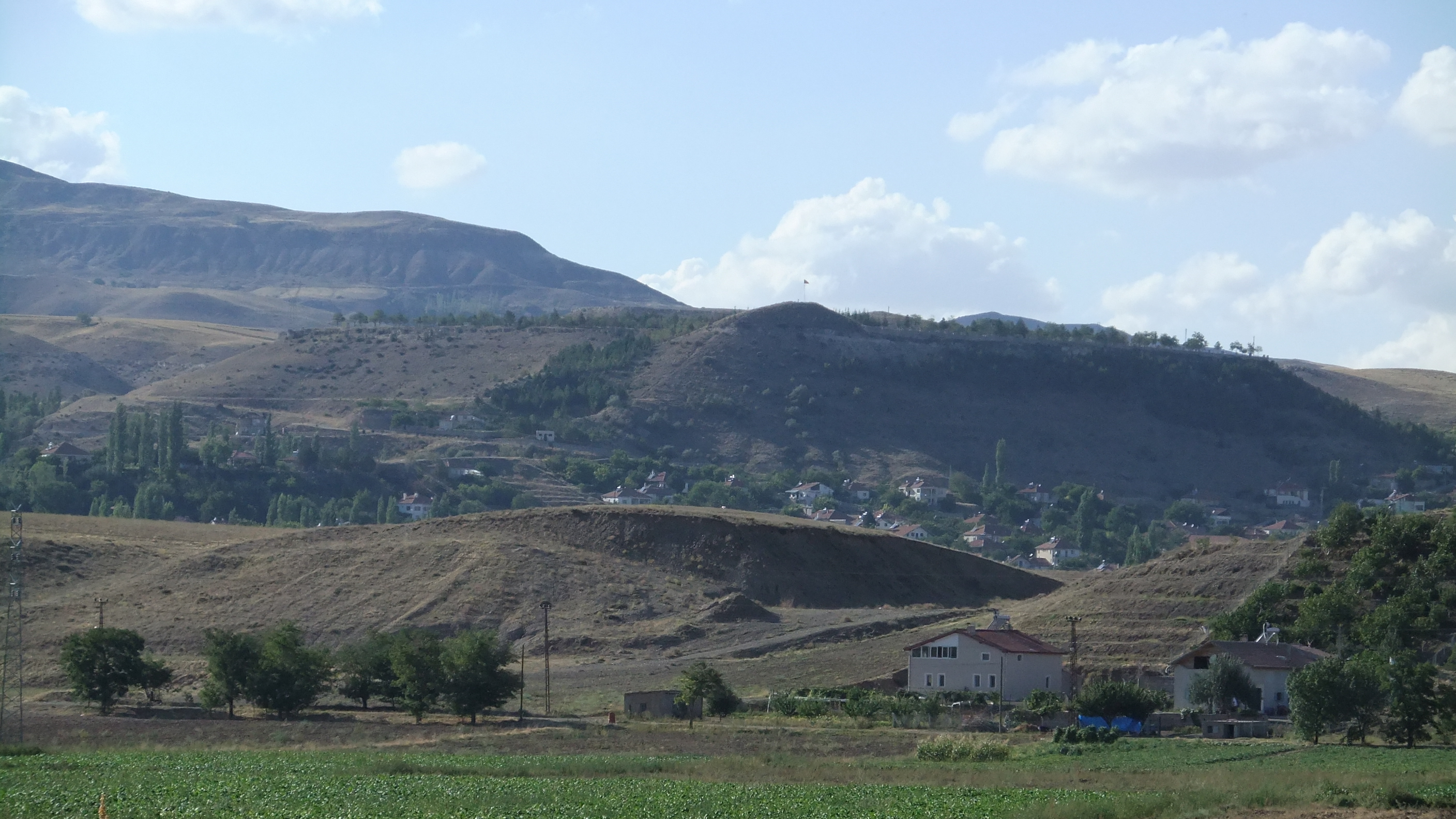 Karaözü Kale Tepesine uzaktan bakış